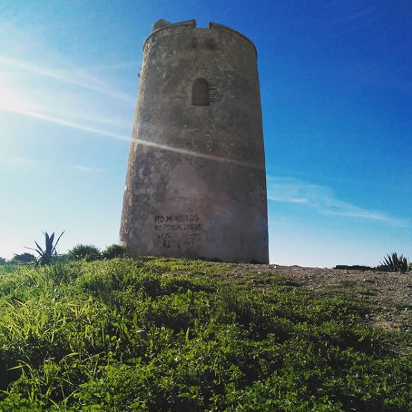 Vista de la torre desde su lado norte.